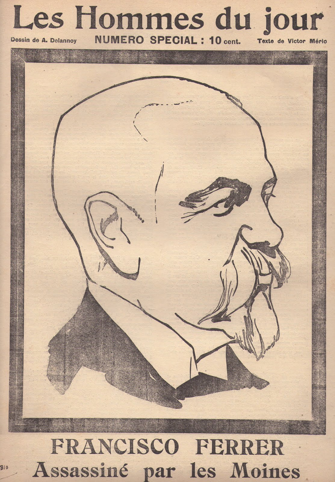 Francisco Ferrer Guardia, né le 10 janvier 1859 à Alella et mort le 13 octobre 1909 à Barcelone, en catalan Francesc Ferrer i Guàrdia, est un libre-penseur, franc-maçon et pédagogue libertaire espagnol. N° spécial Les Hommes du jour.